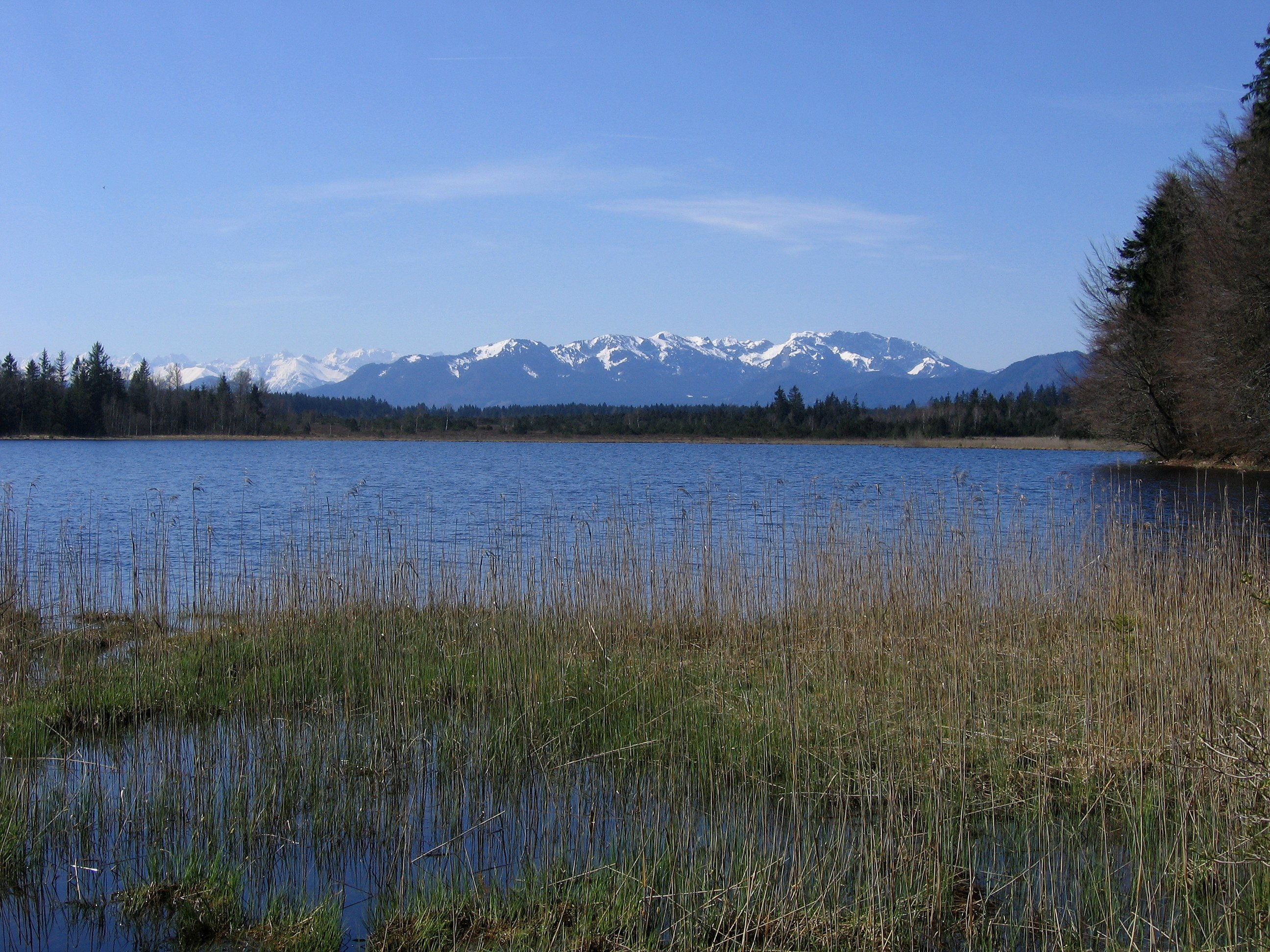 Kirchsee